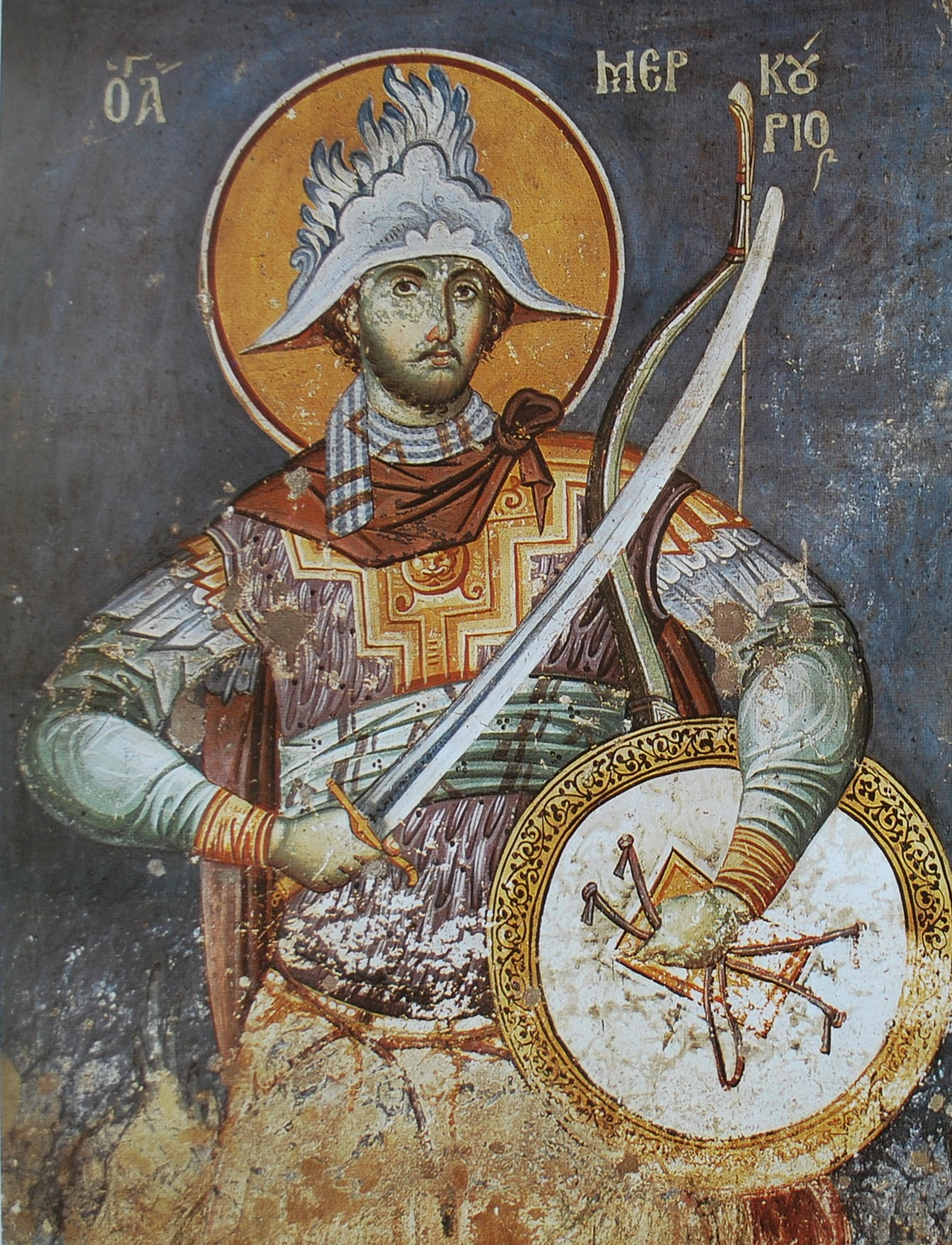 Св. Меркурий. Фреска в Прорате